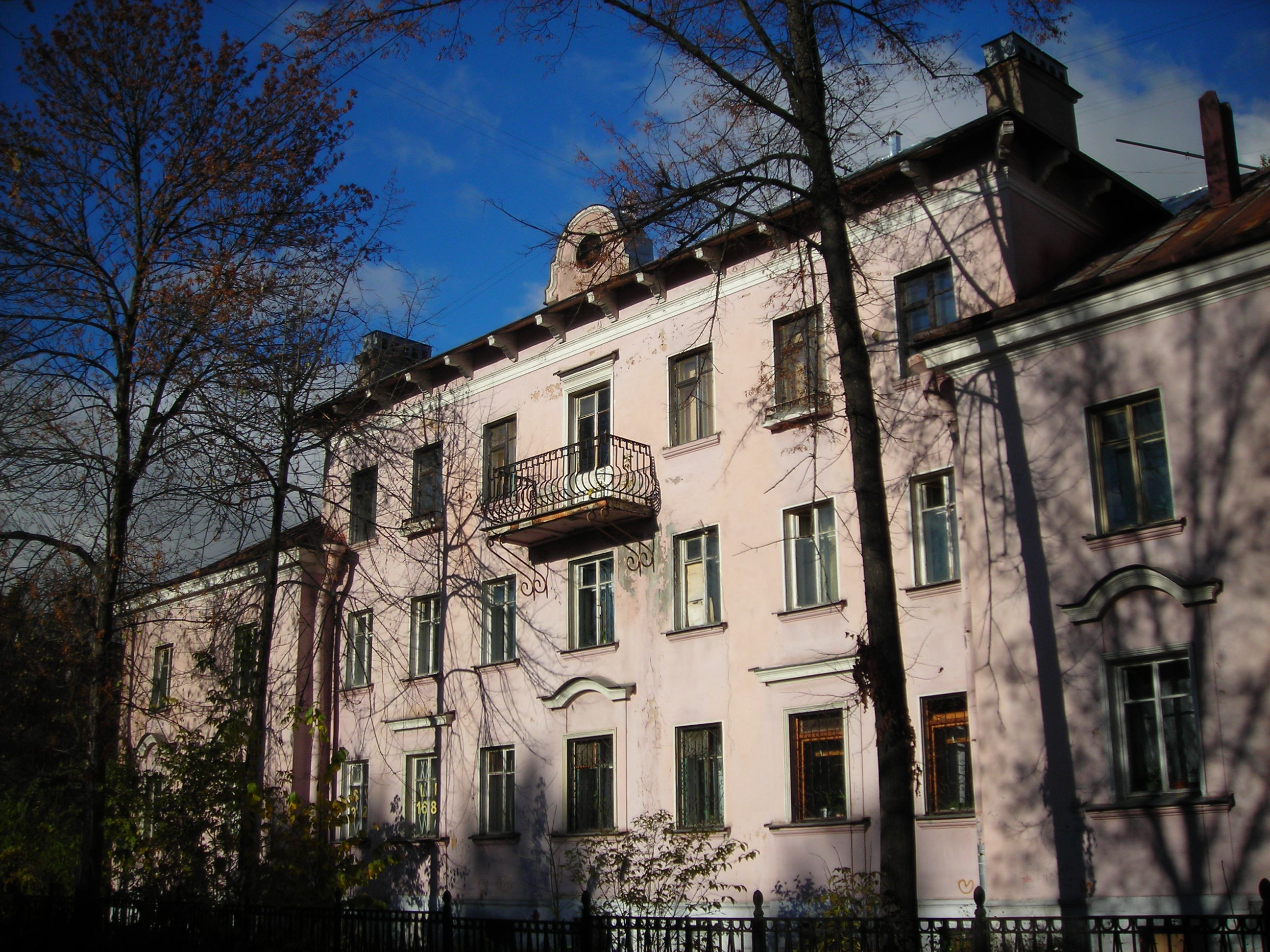 Dibunovskaya street, Spb